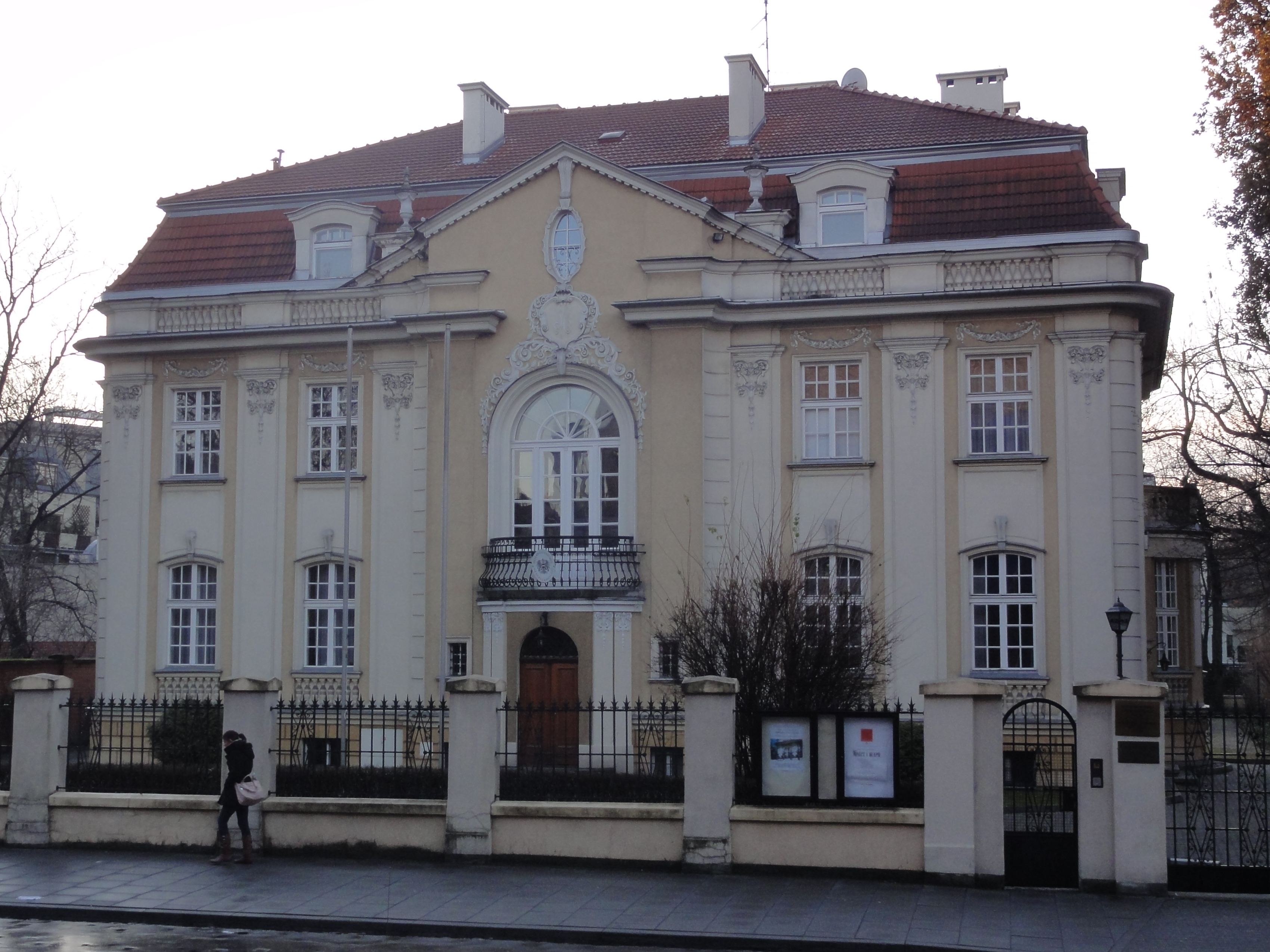 Konsulat Generalny Austrii w Krakowie, ul Krupnicza